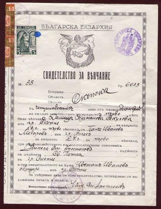 Свидетелство за женитба, Скопска епархия